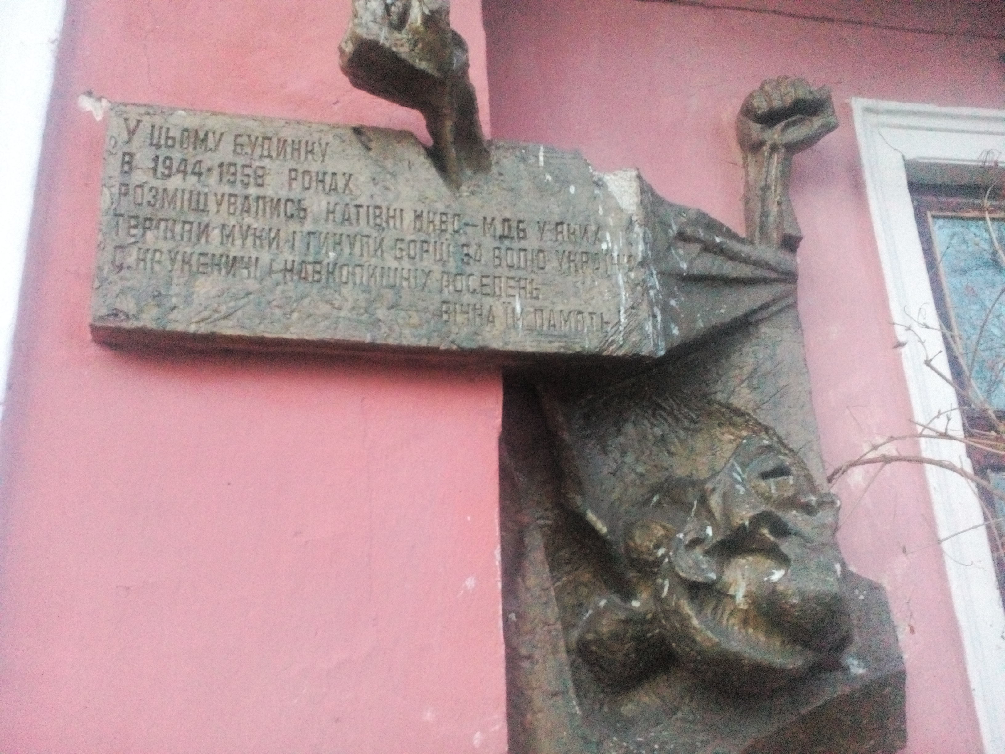 памятна дошка крукеничі